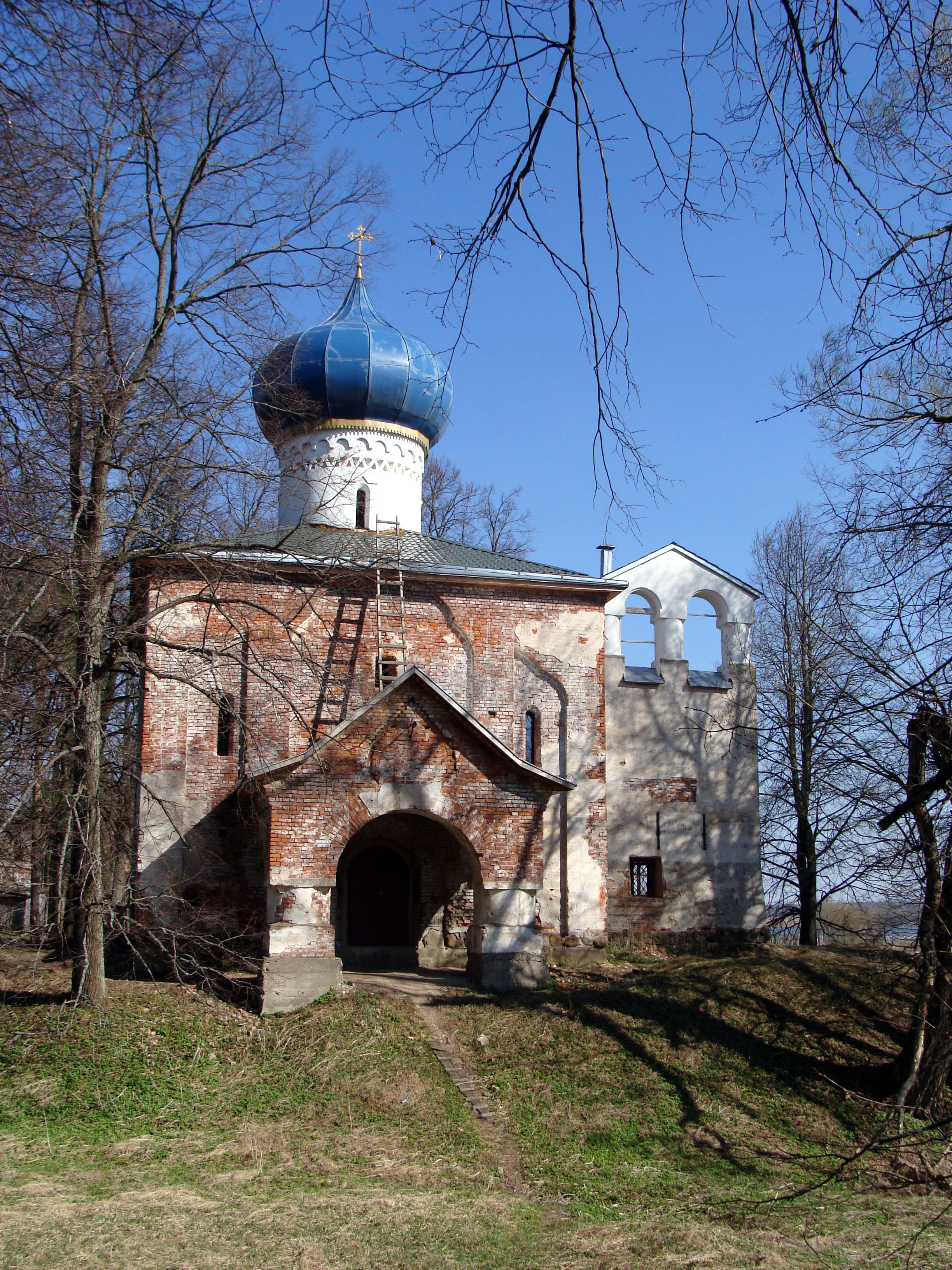 Церковь на берегу Рузского водохранилища